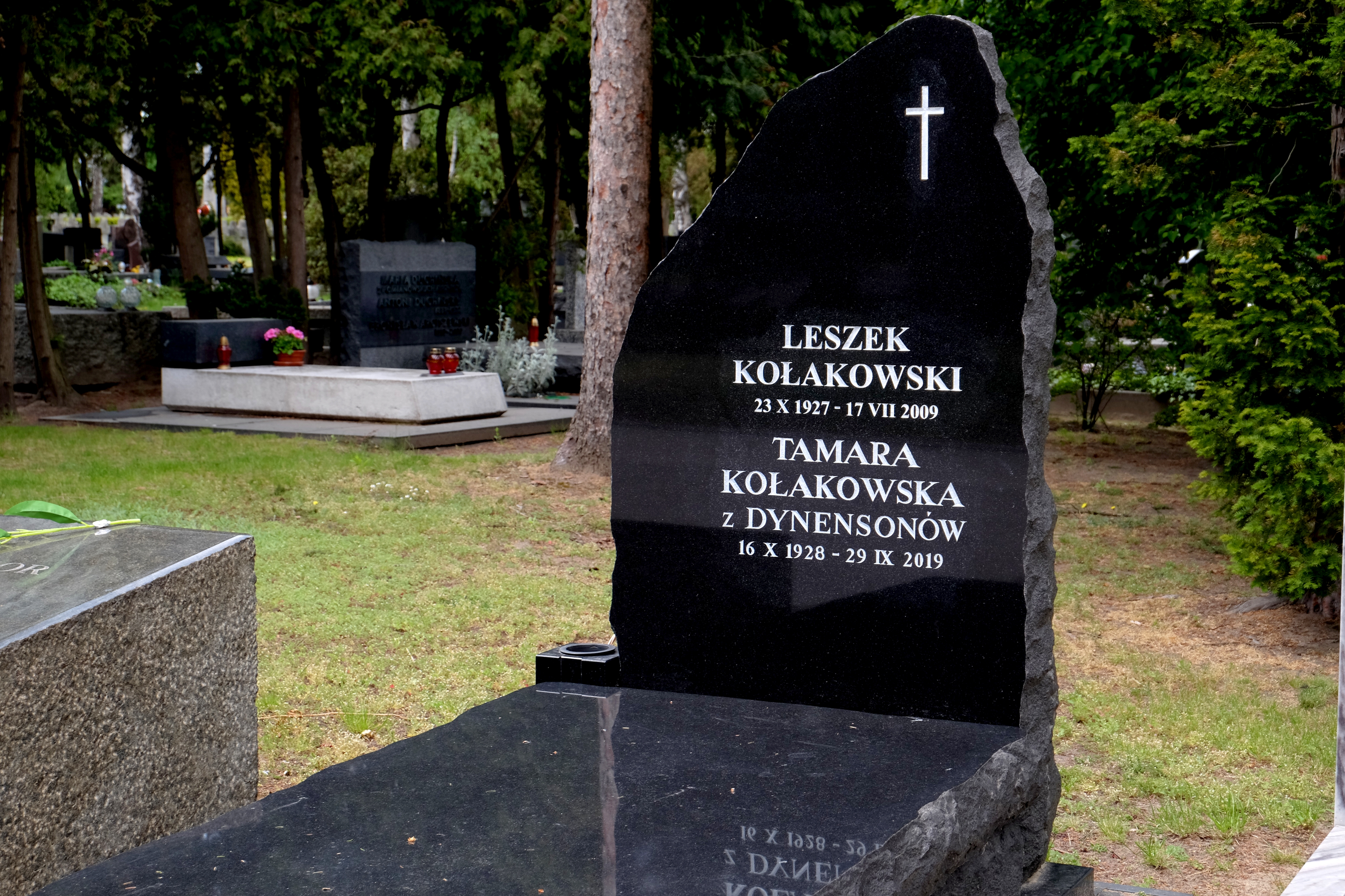 Grób prof. Leszka Kołakowskiego i jego żony Tamary Kołakowskiej na Cmentarzu Wojskowym na Powązkach w Warszawie